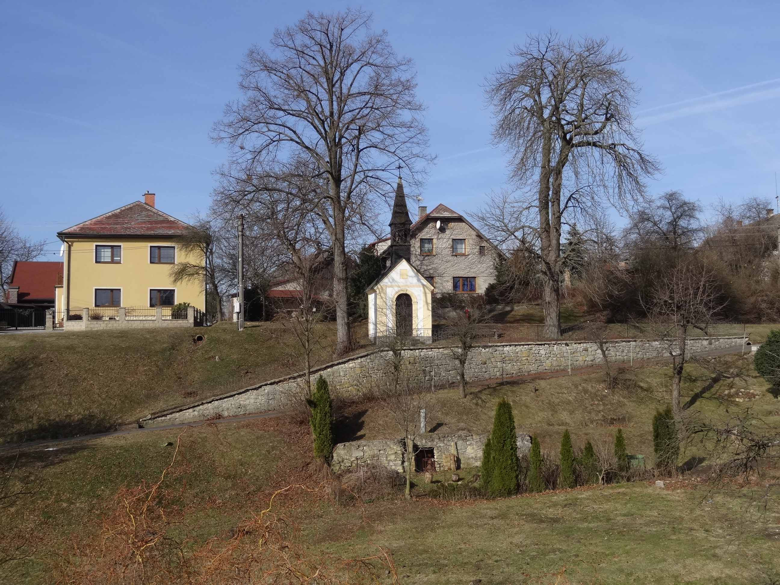 Kaplička se zvoničkou, v centru obce, Žďárek.